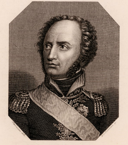 Achteckiges Brustbild. Unten: "H. M. A. BRUNE." und Verlegeradresse: "Zwickau b. d. Gebr. Schumann.", um 1826, Stahlstich, Edition: Bildnisse der berühmtesten Menschen aller Völker und Zeiten Zwickau : Gebr. Schumann 1826 Suite 24, No. 278, Literatur: Ohne Nachweis in Drugulin